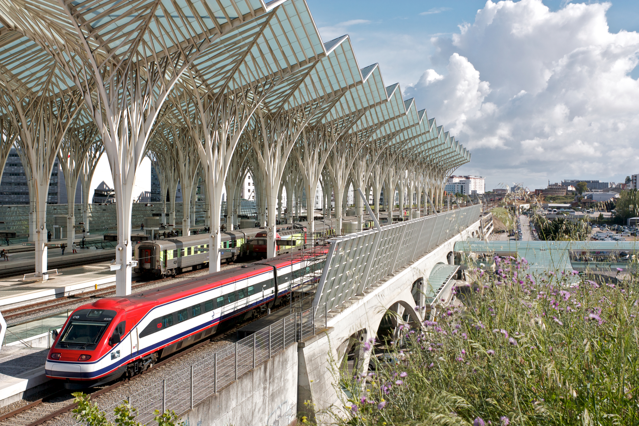 Tipo: Comboio Alfa Pendular 127 [Lisboa • Santa Apolónia - Porto • Campanhã] Local: Gare do Oriente [Linha do Norte, PK 6] Data e hora: 21 de Abril de 2011 [17h07] Material: Automotora 4009 Manoel de Oliveira [Comboio de Pendulação Activa]